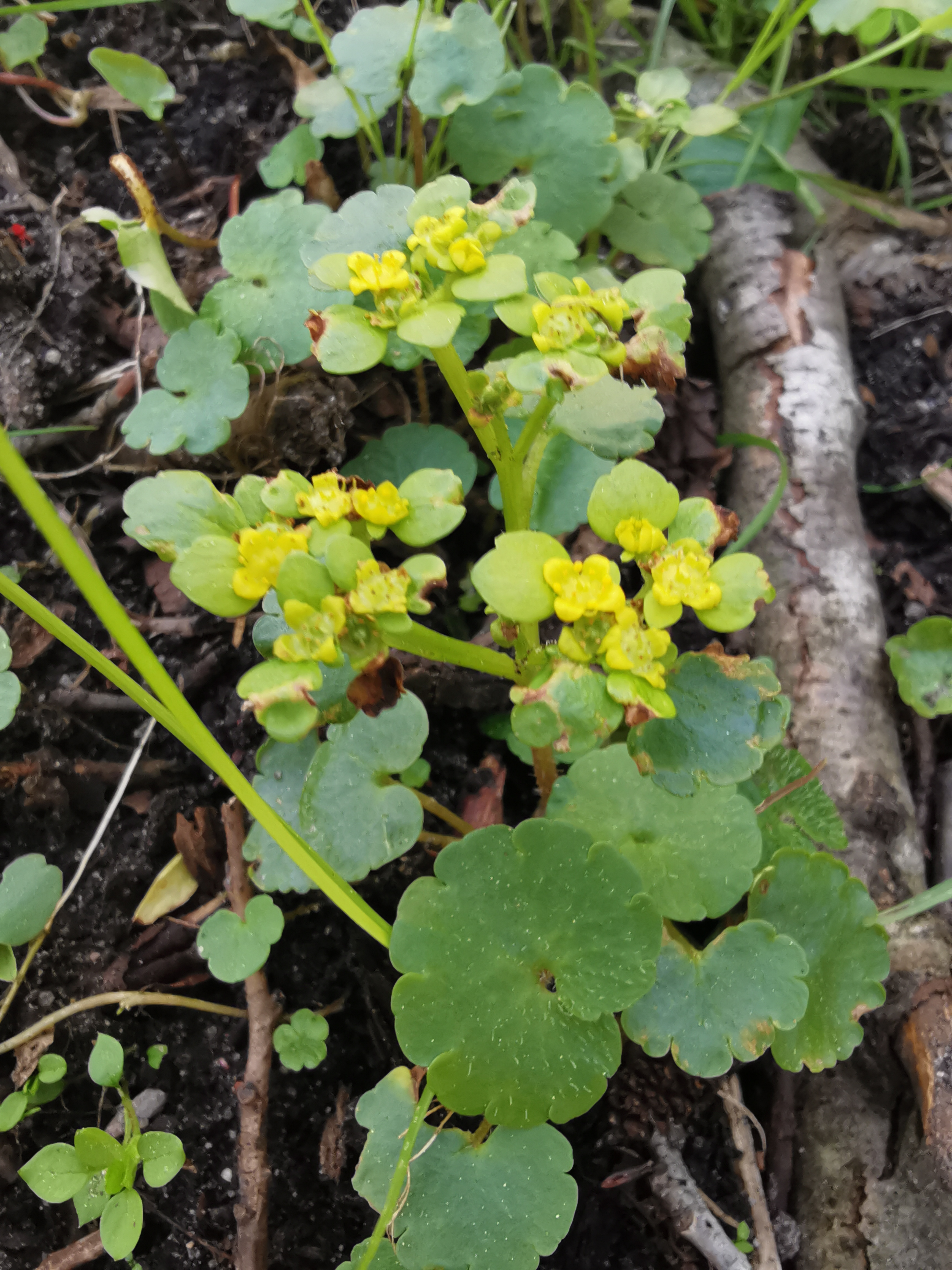 Śledziennica skrętolistna (Chrysosplenium alternifolium L.) w obszarze rezerwatu przyrody Źródliskowe Torfowisko